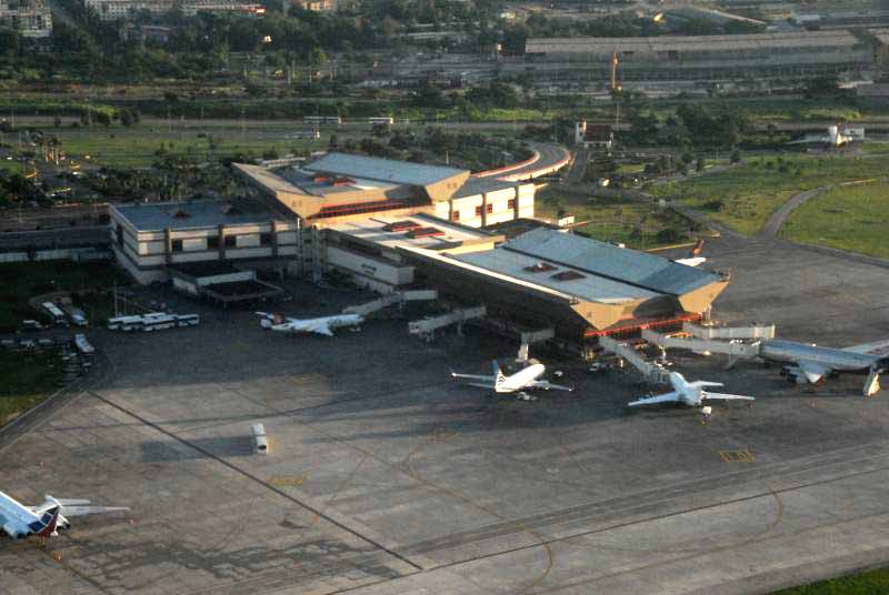 Havana, Cuba, augustus 2006 Eigen foto, detail in Metadata